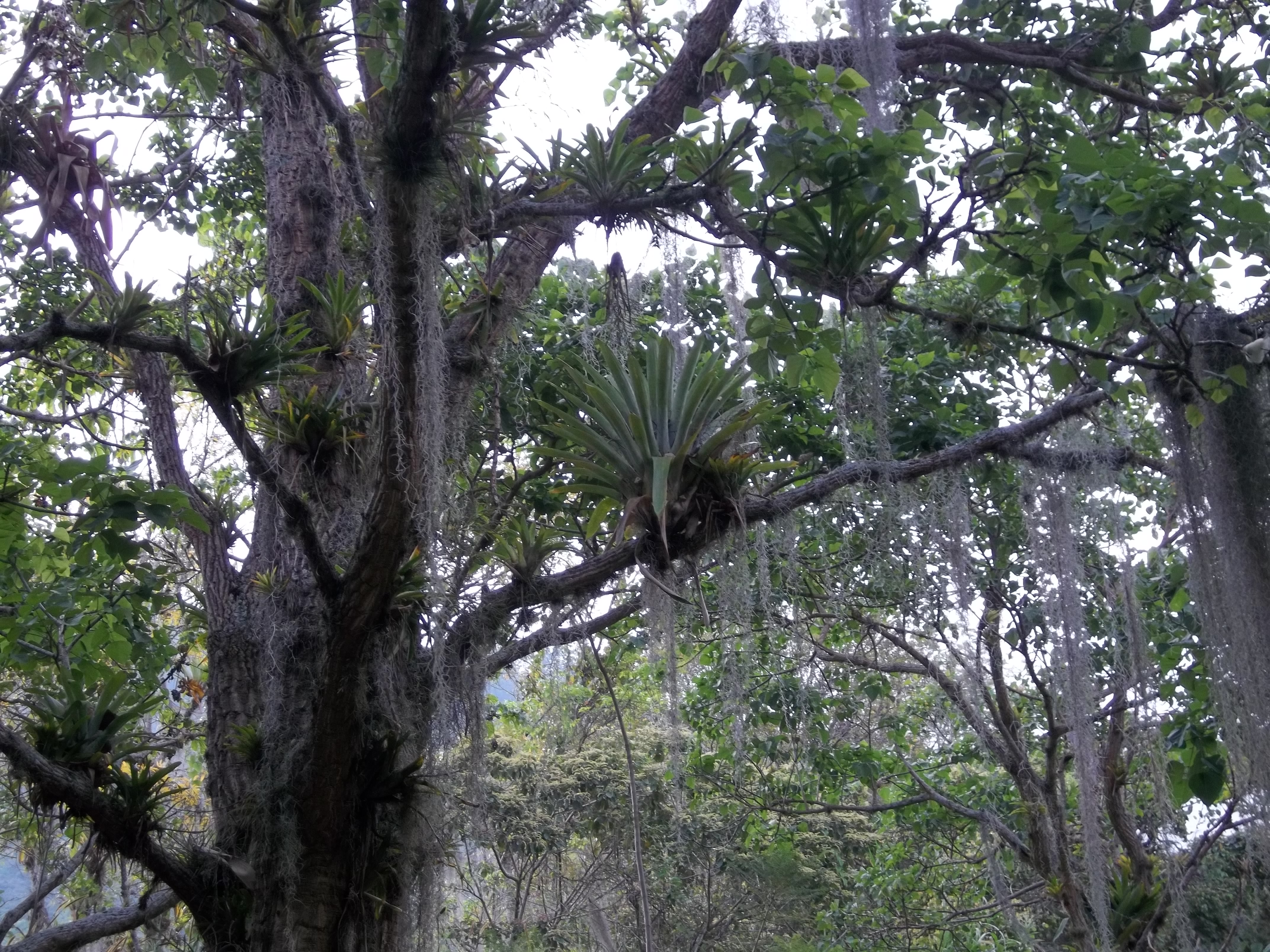 La barba de palo o la Tillandsia usneoides, es una especie indicadora de una buena calidad del aire.